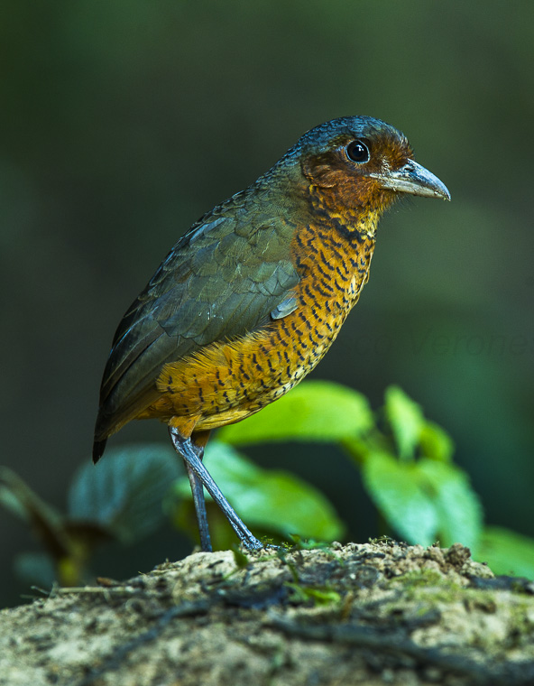 Giant antpitta (Grallaria gigantea) - Mindo - Ecuador_S4E5139